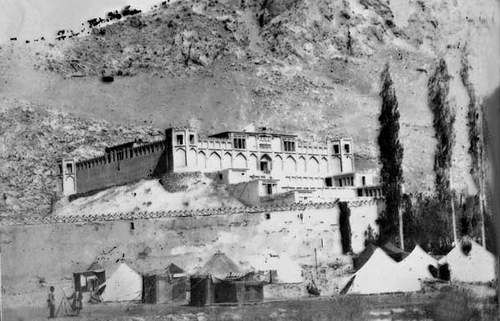 Qajar Qasr Palace